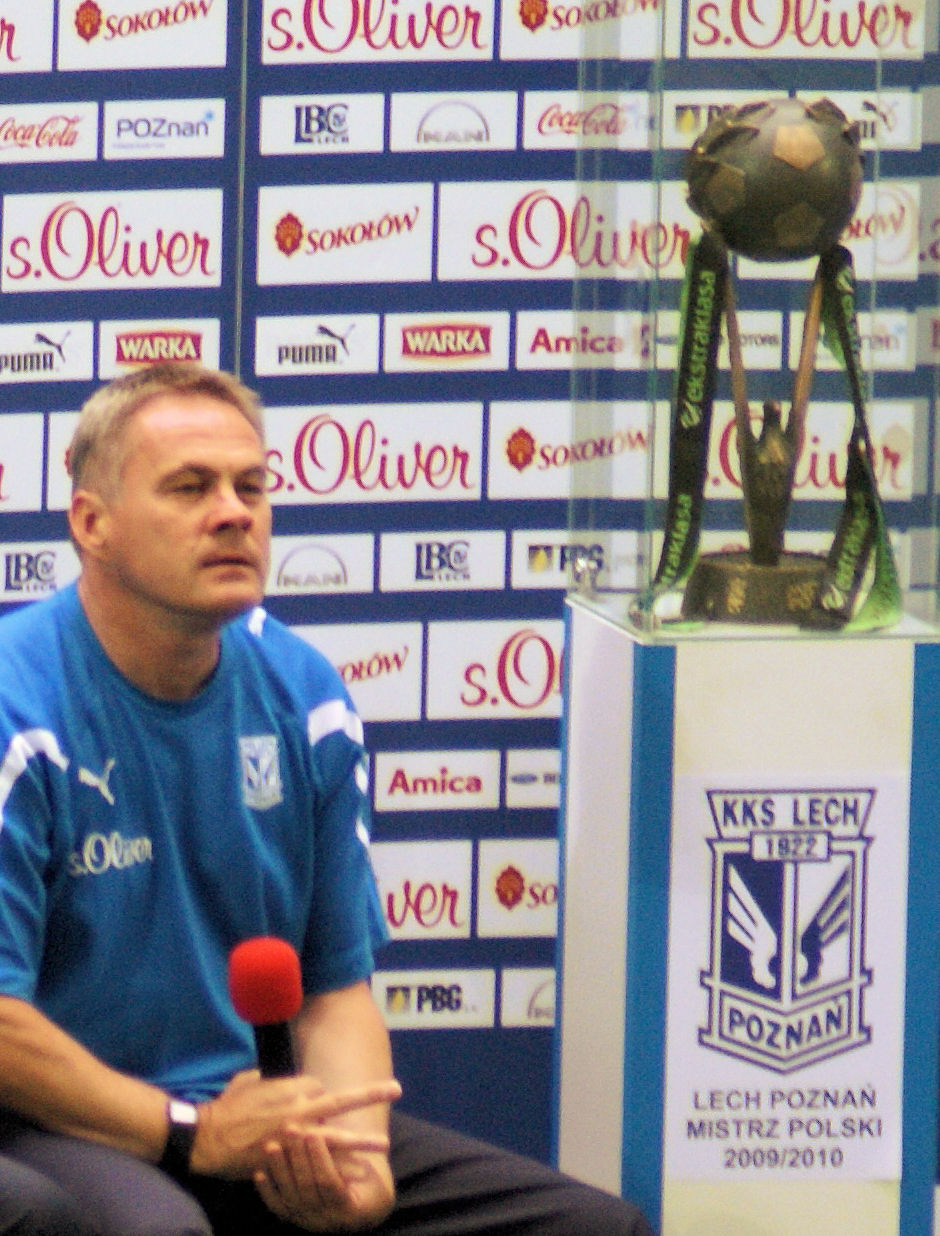 Trener drużyny Lech Poznań, Jacek Zieliński przy Pucharze Mistrza Polski za sezon 2009/2010, prezentacja piłkarzy na Stadionie Miejskim przed sezonem 2010/2011.